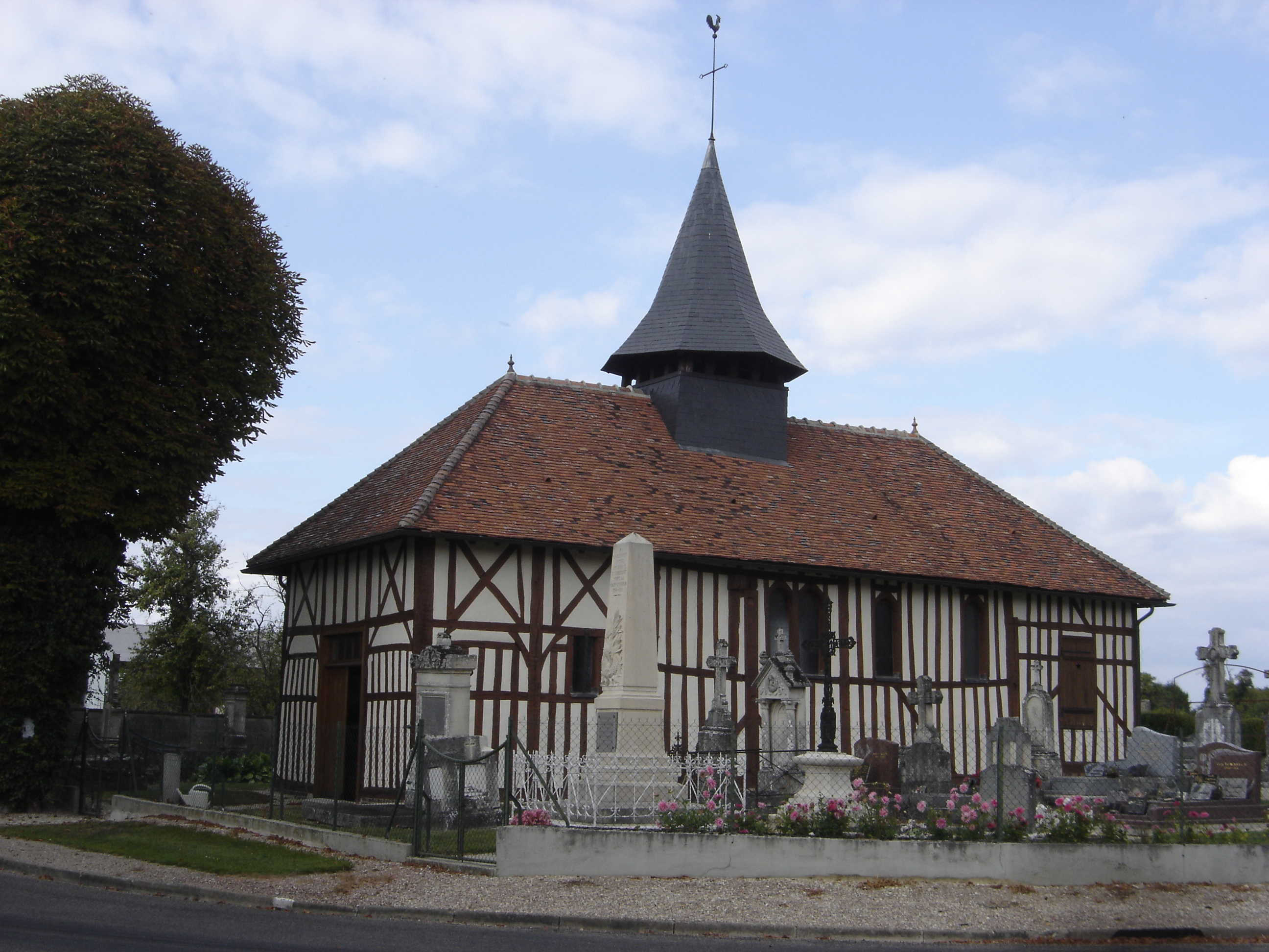 église Saint-Jean-Baptiste de Morembert (à pans de bois) - Aube - France